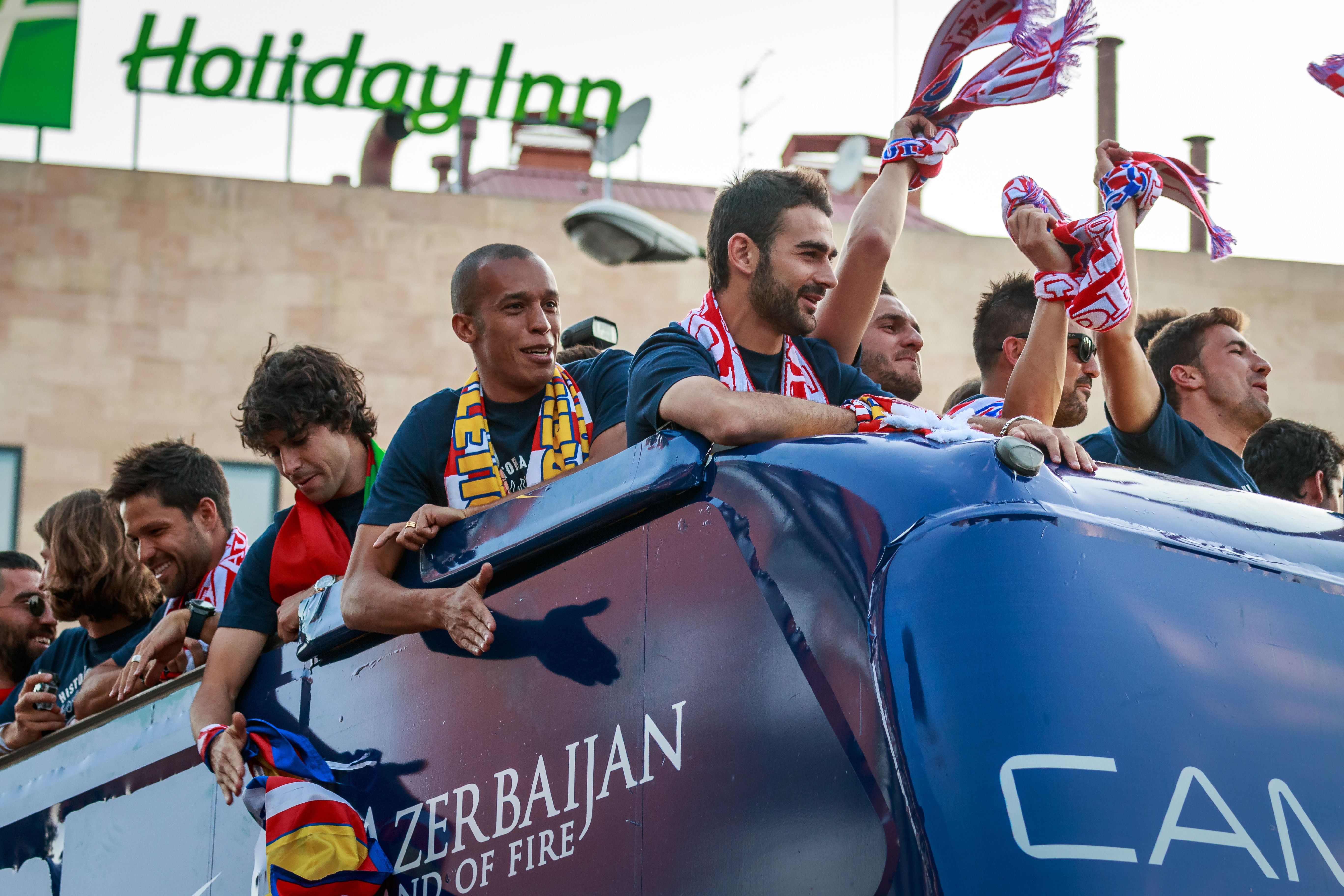 Festejos del Atlético de Madrid tras ganar la Liga BBVA 2013/2014.